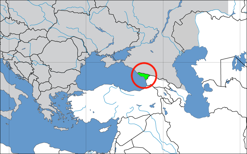 Ver Image:Location of Abkhazia in Europe.png